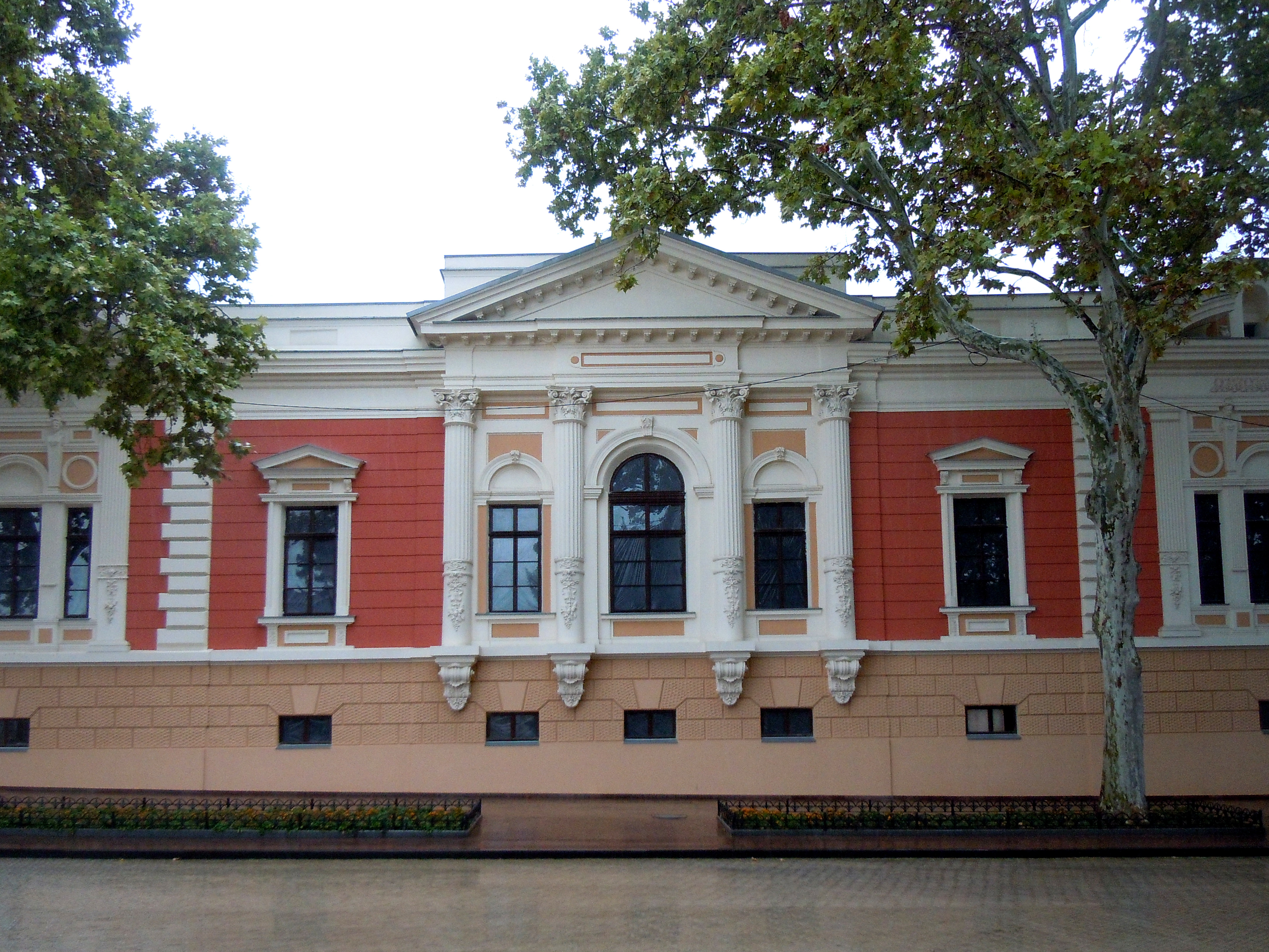 Будівля Англійського клубу (музей Морського флоту), де у 1918 році розміщувався Одеський губернський комітет РСДРП, 2 пам'ятних знаки на честь кораблів і моряків торговельного флоту, які відзначилися під час Жовтневої революції і Великої Вітчизняної війни, Одеса, вул. Ланжеронівська, 6